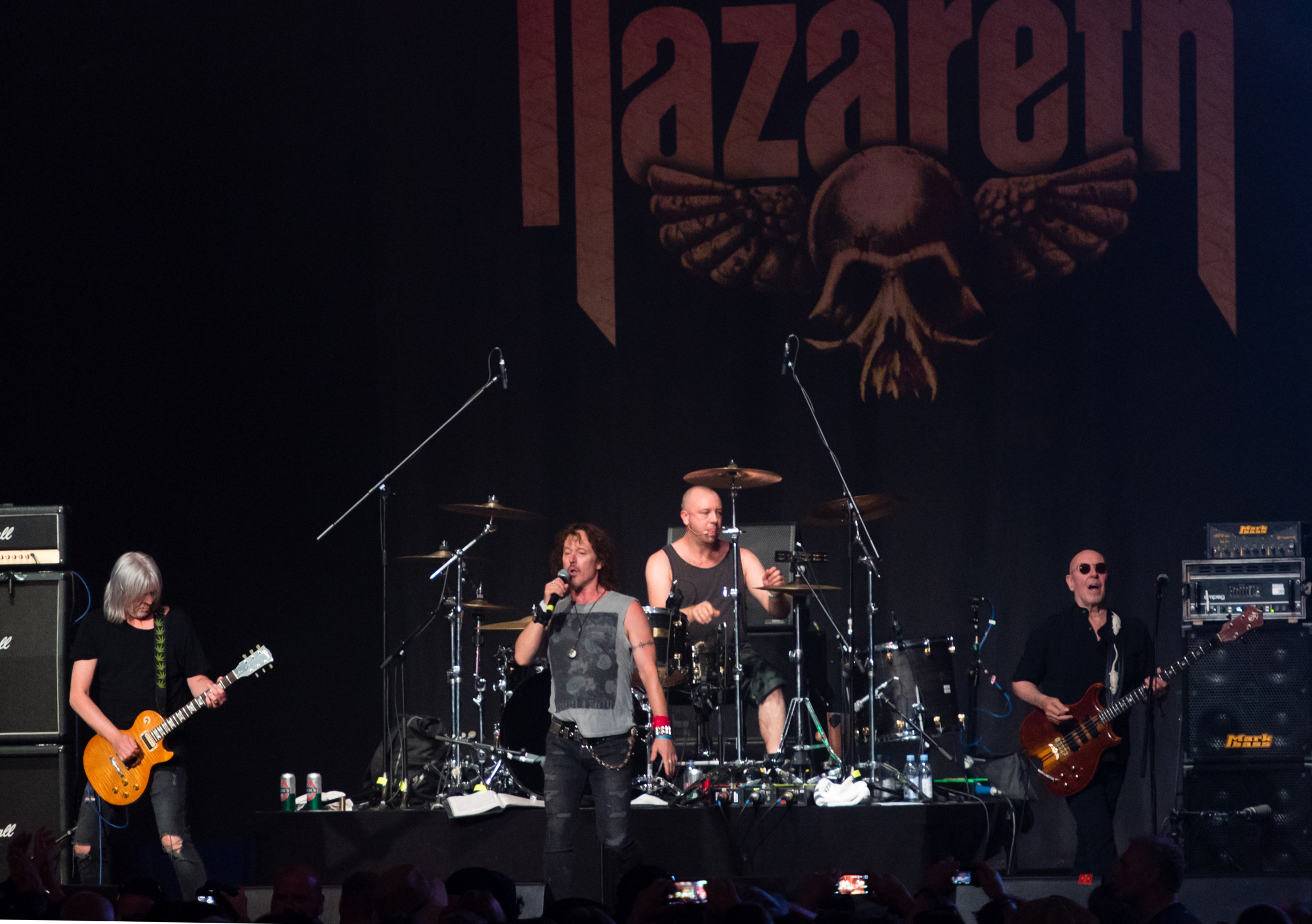 Nazareth beim Wacken Open Air 2018